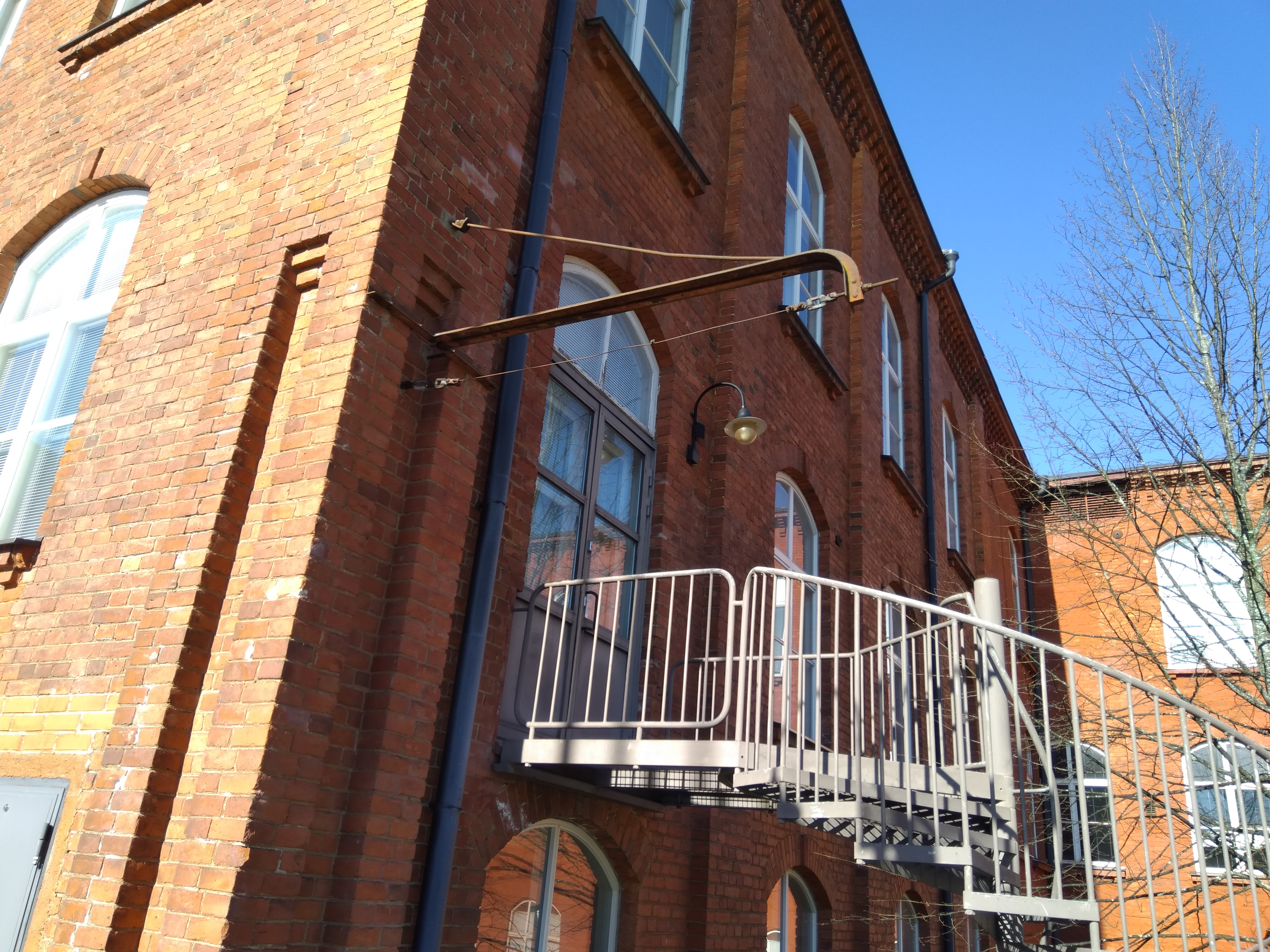 Forssan sähkörataan kuulunut johdonkannatin